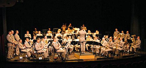 Concert de la Musique de la Légion étrangère à Aubagne (France)